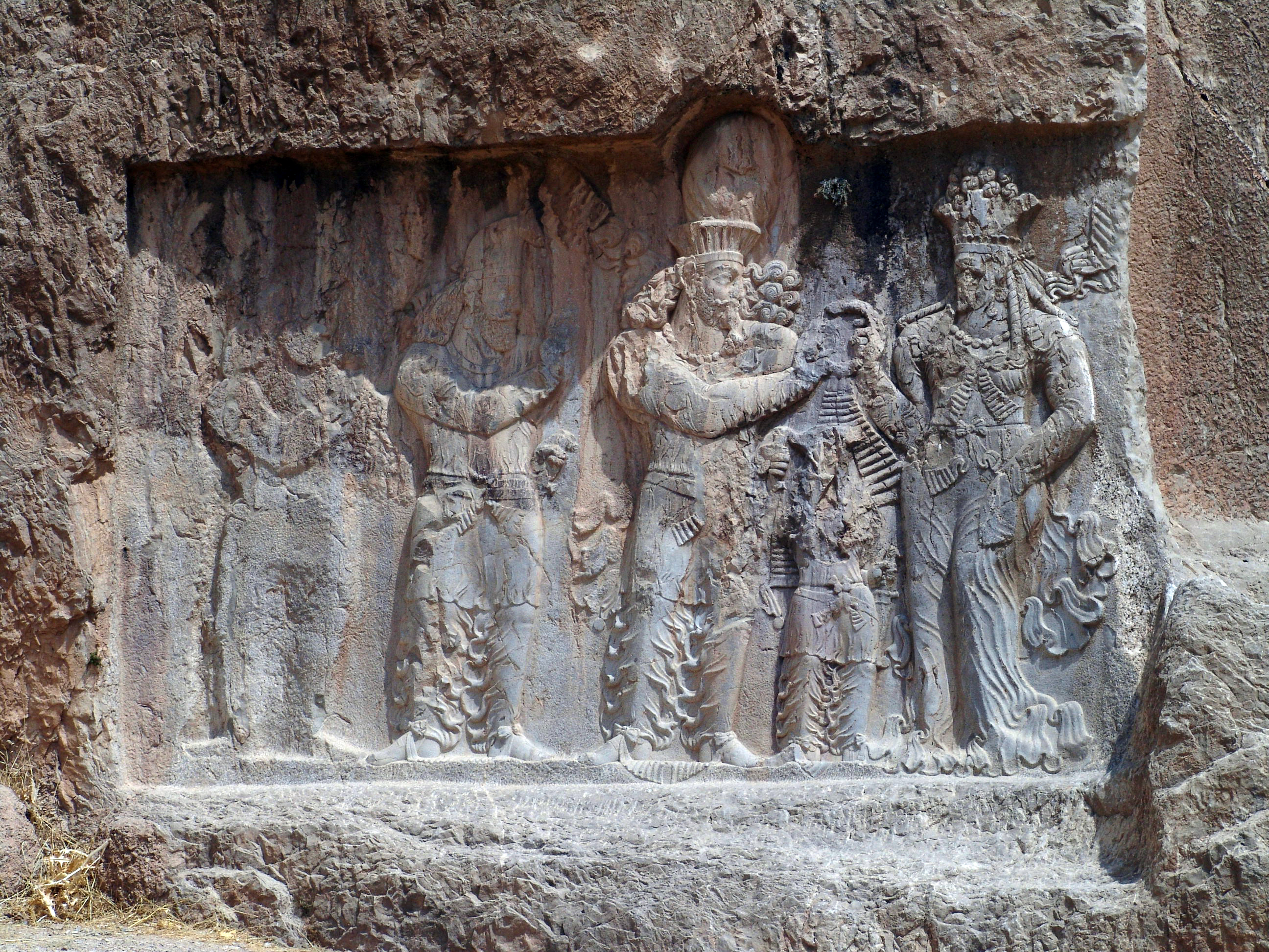 نقش رستم، مرودشت، فارس، ایران